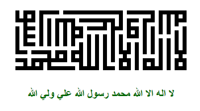 ля илаху илля лах